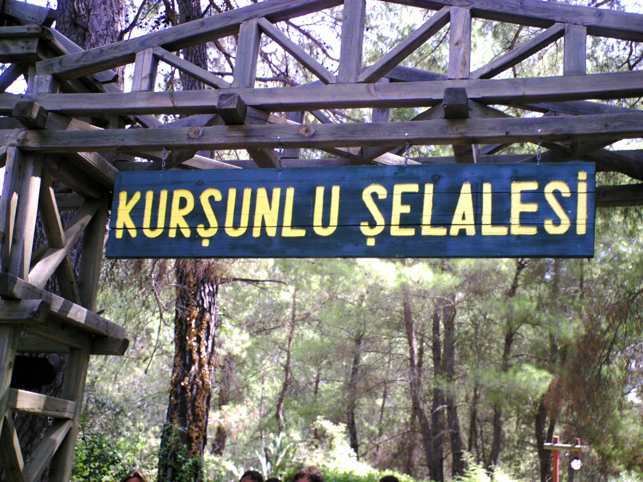 Das Bild stellt den Eingang des Wasserfalls "Selale" des türkischen Ortes Kursunlu dar.